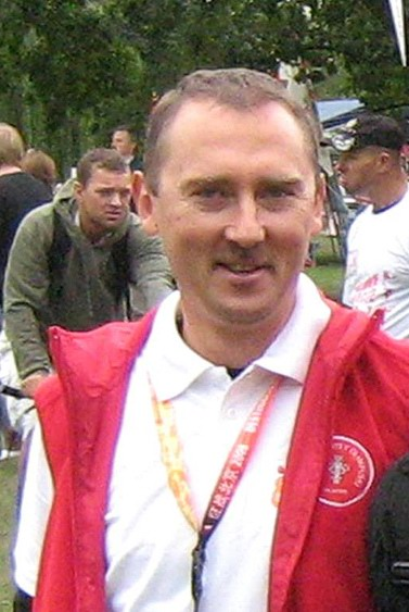 Ryszard Ostrowski - polski lekkoatleta